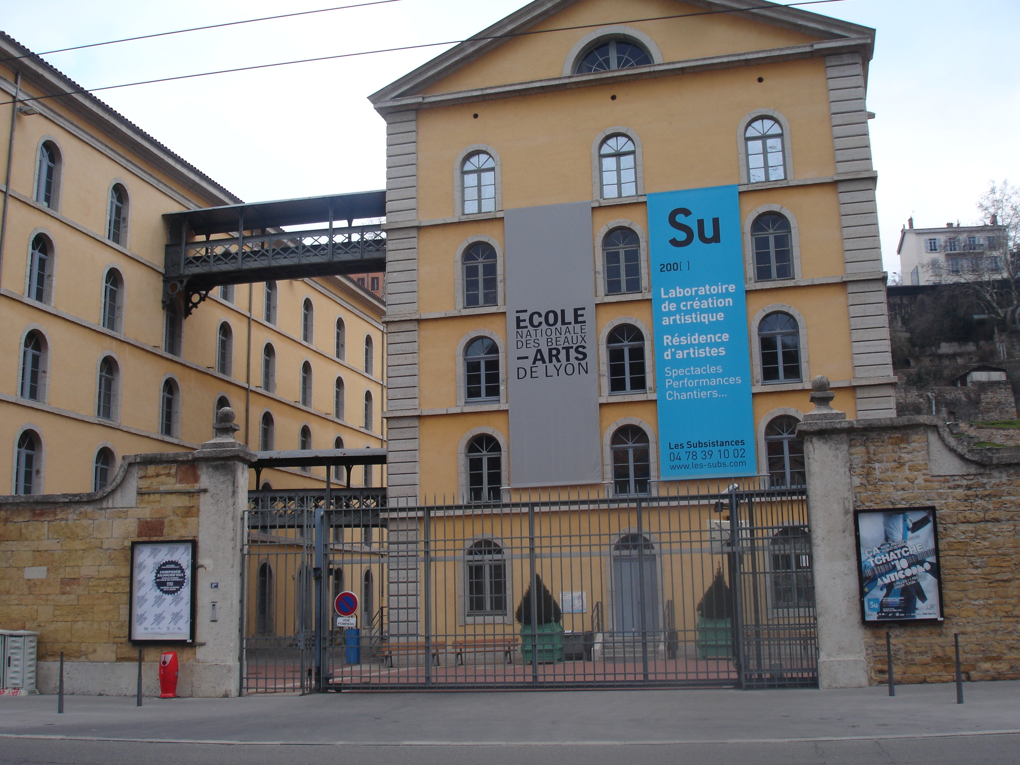 Lyon Les Subsistances, entrée côté école nationale des beaux arts